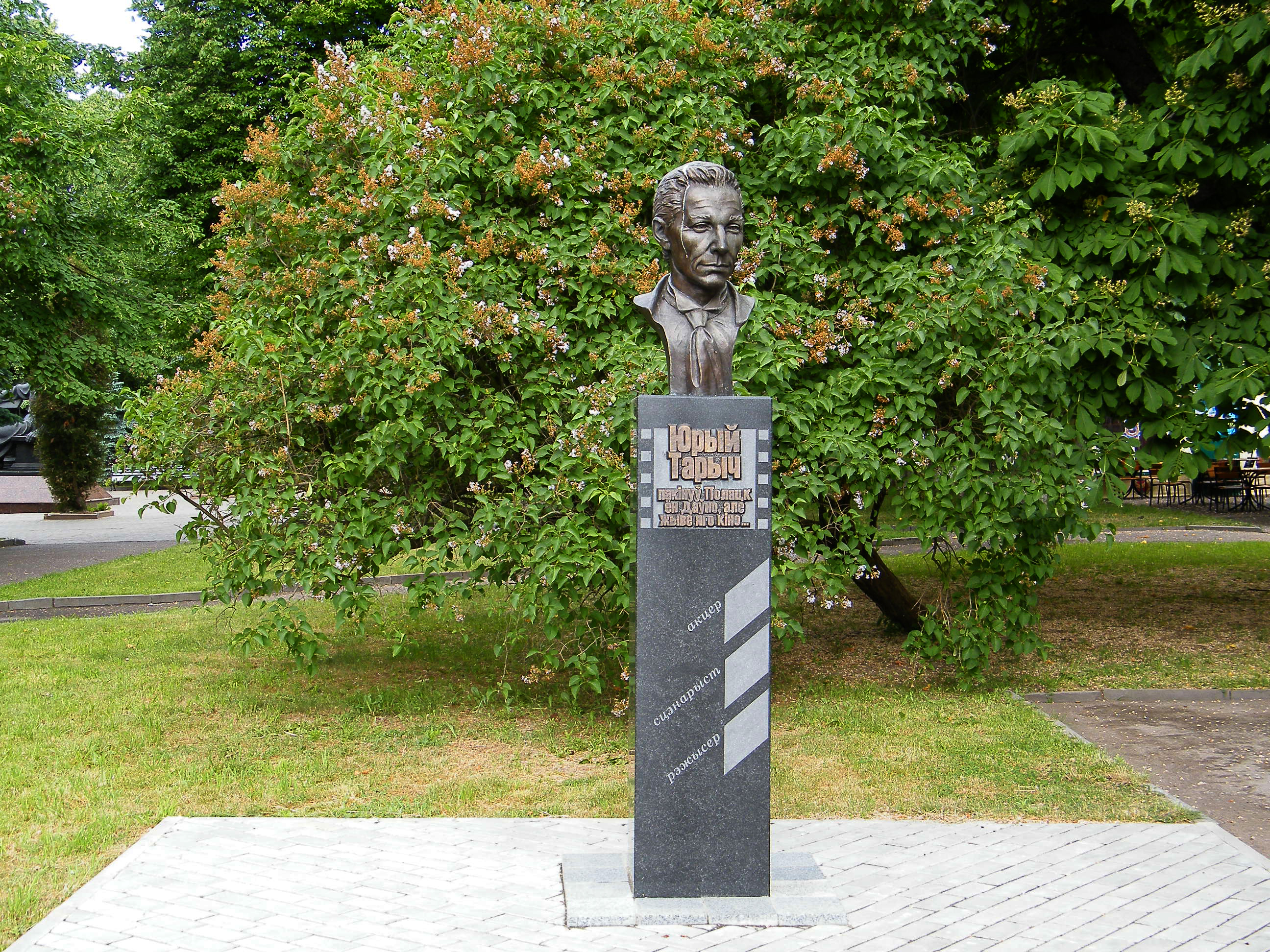 Бюст Юрия Тарича